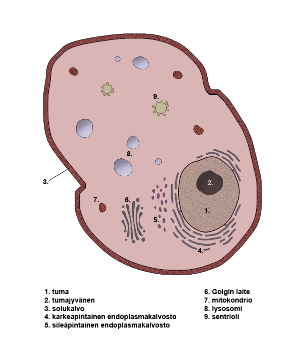 Eläinsolun rakenne.